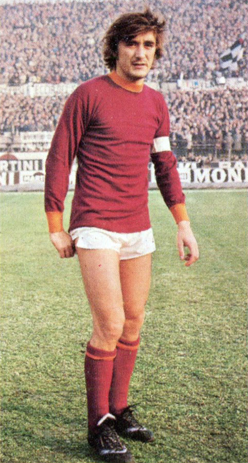 Il calciatore italiano Franco Cordova, capitano della Roma, all'inizio della stagione 1974-75.